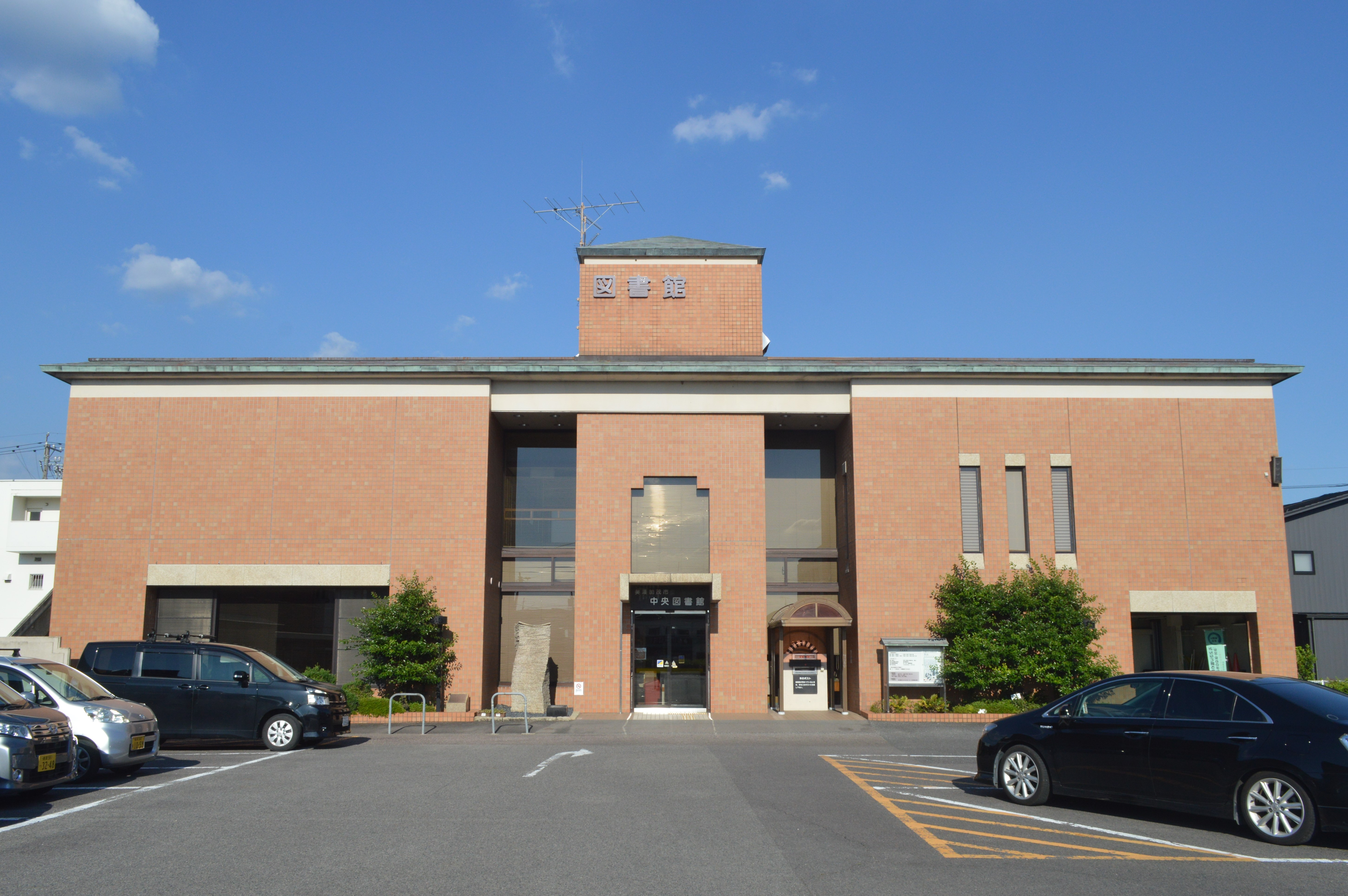 岐阜県美濃加茂市にある美濃加茂市中央図書館。